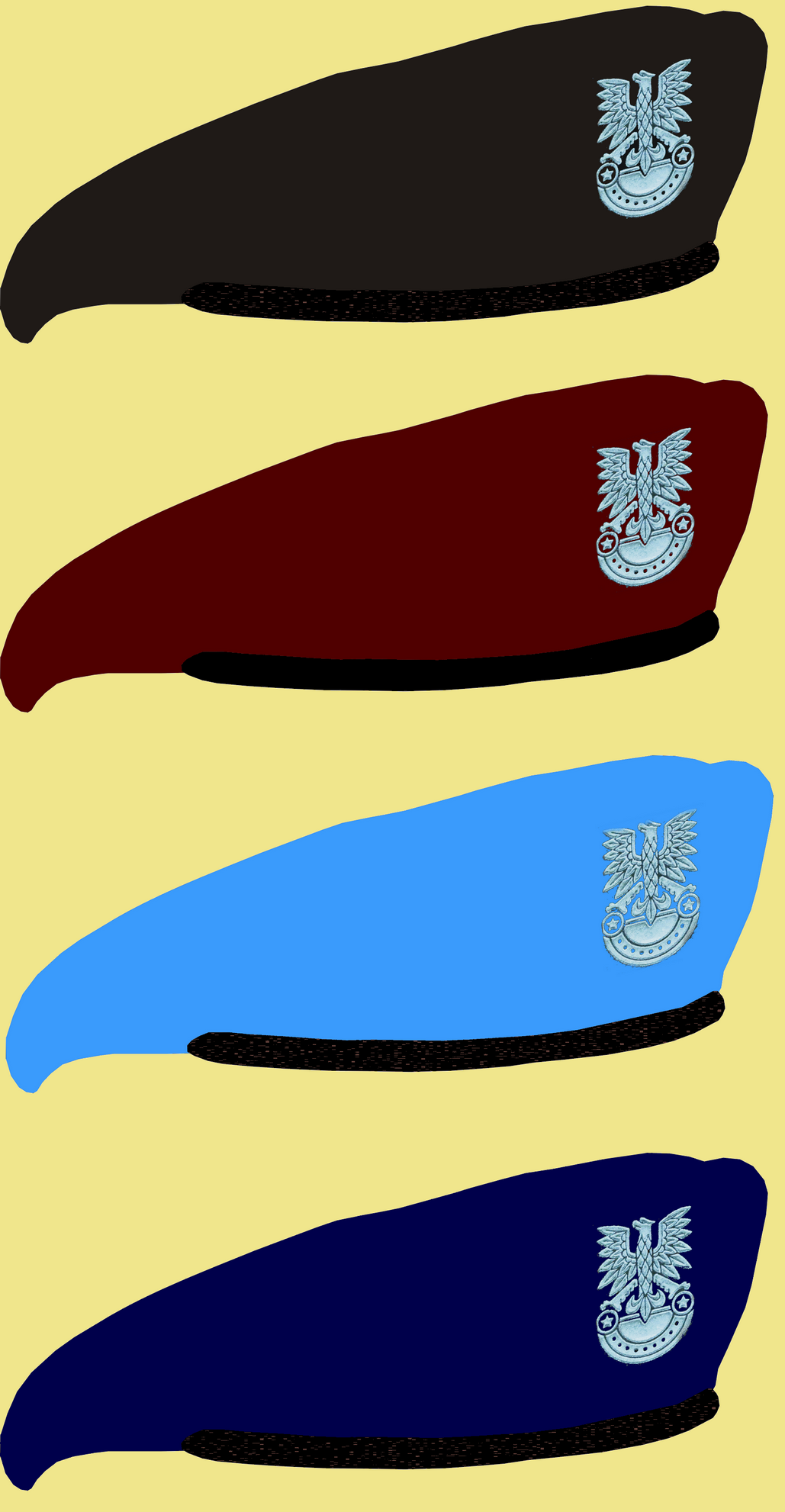 Berety używane w siłach zbrojnych PRL